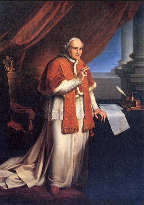 ritratto di papa pio VIII